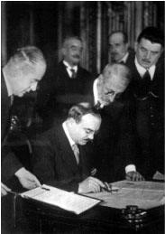 Посол СССР во Франции Валериан Довгалевский подписывает договор о ненападении между СССР и Францией